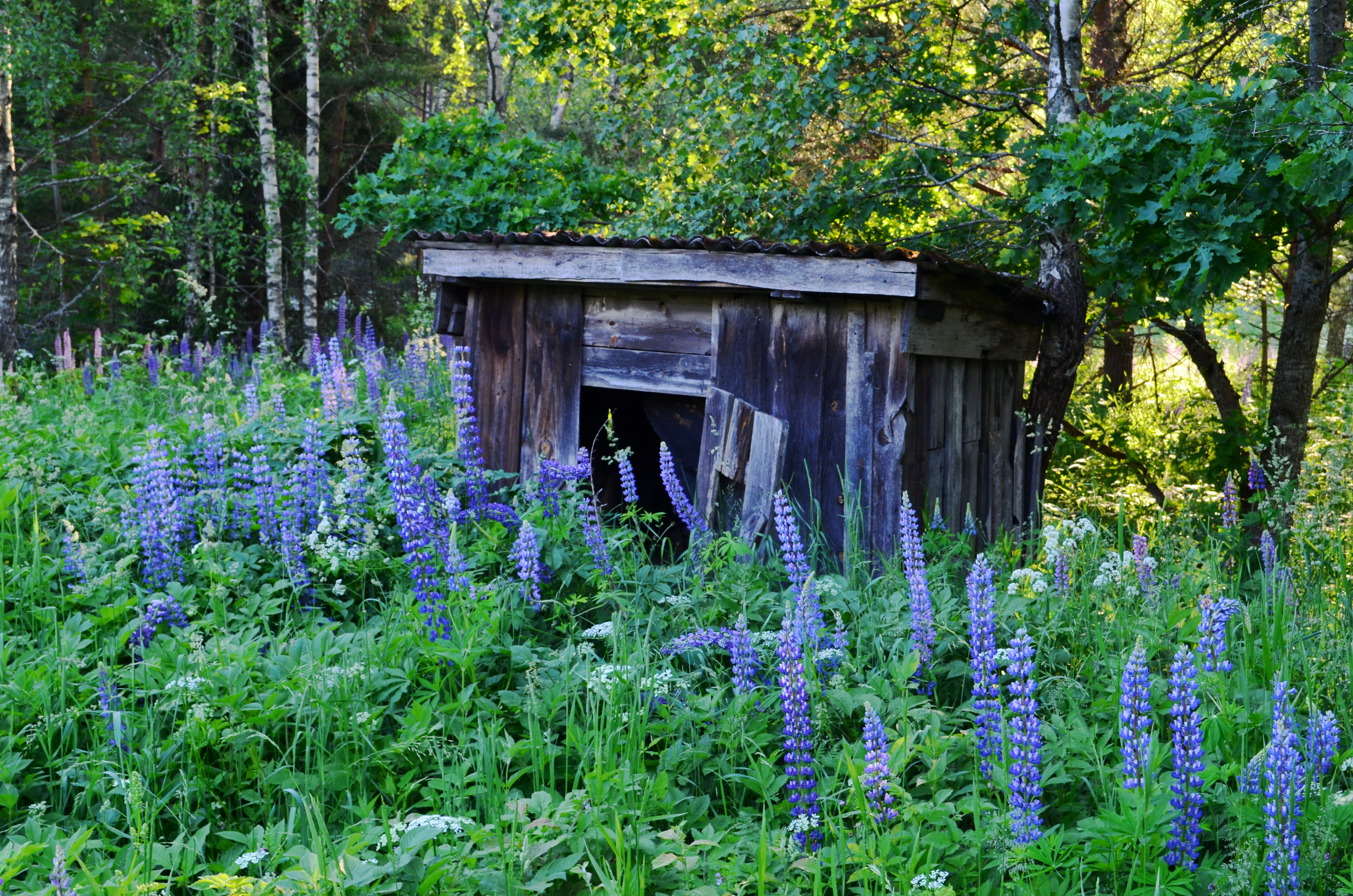 Buvusi rūkykla?, Bajorėliai, Zarasų r.